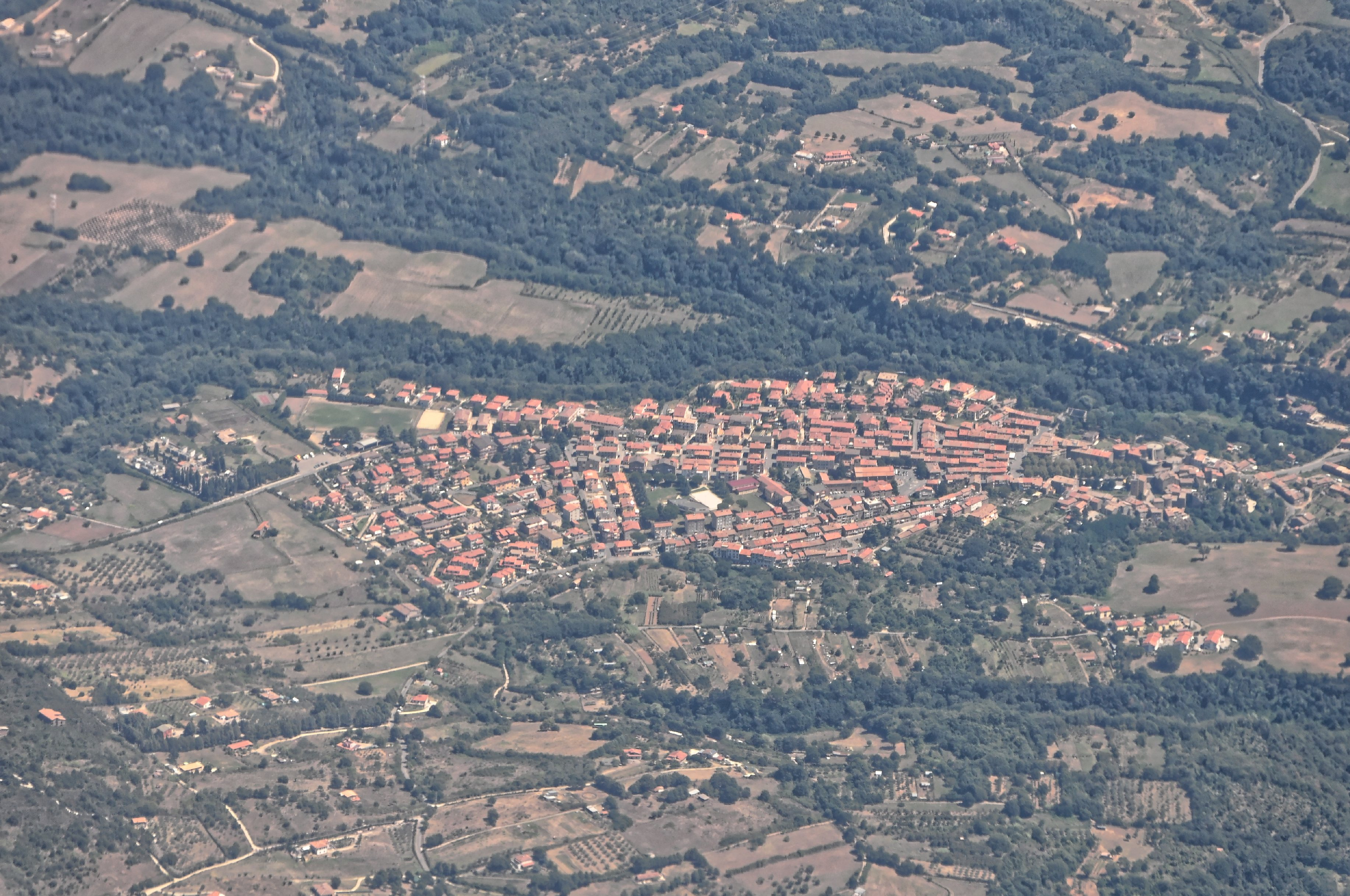 Bilder vom Flug -Rom-Düsseldorf-Hamburg 2013 Dieses Foto entstand in Zusammenarbeit mit Stadtbesichtigungen.de Die Seiten Stadtbesichtigungen.de, der dazugehörige Reise Blog sowie die Facebookseite: Stadtbesichtigungen Rom dürfen dieses Bild für Ihre Veröffentlichungen ohne den Hinweis auf Wikipedia, Commons bzw der Lizenz verwenden. Die Verantwortlichen habe von mir (Ra Boe) die Originaldaten zur freien Verfügung übermittelt bekommen.